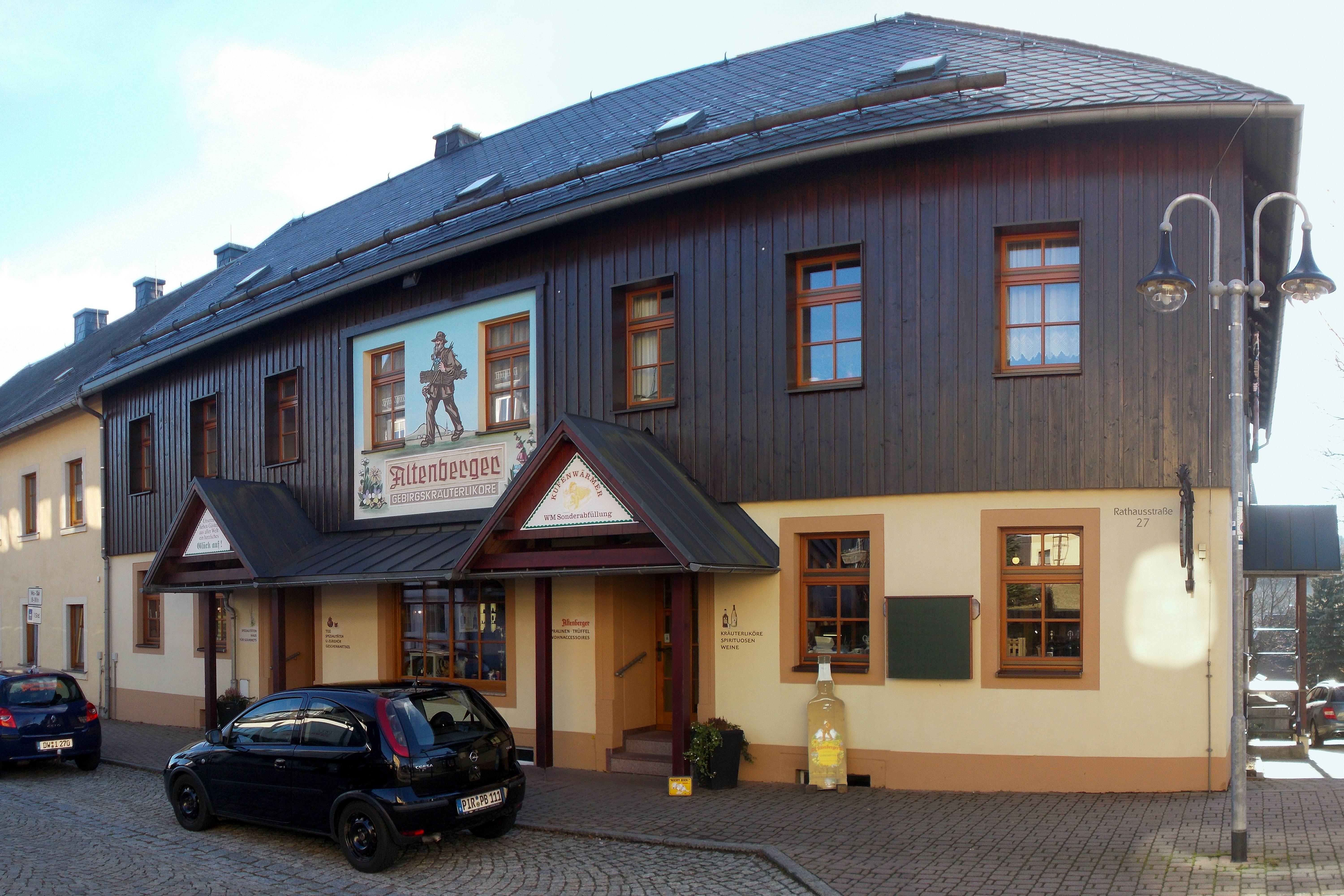 Altenberger Gebirgskräuterliköre - Fabrik und Verkauf Altenberg - November 2013